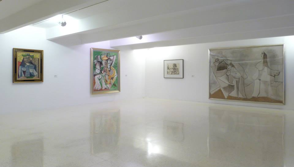 De izquierda a derecha;(Retrato de Dora Maar 1941; Desnudo y Hombre Sentado 1969; Grabado y Dos Figuras acostadas.